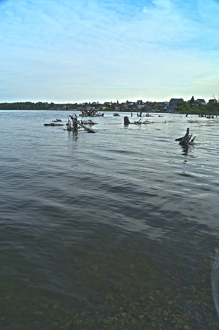 Сугояк